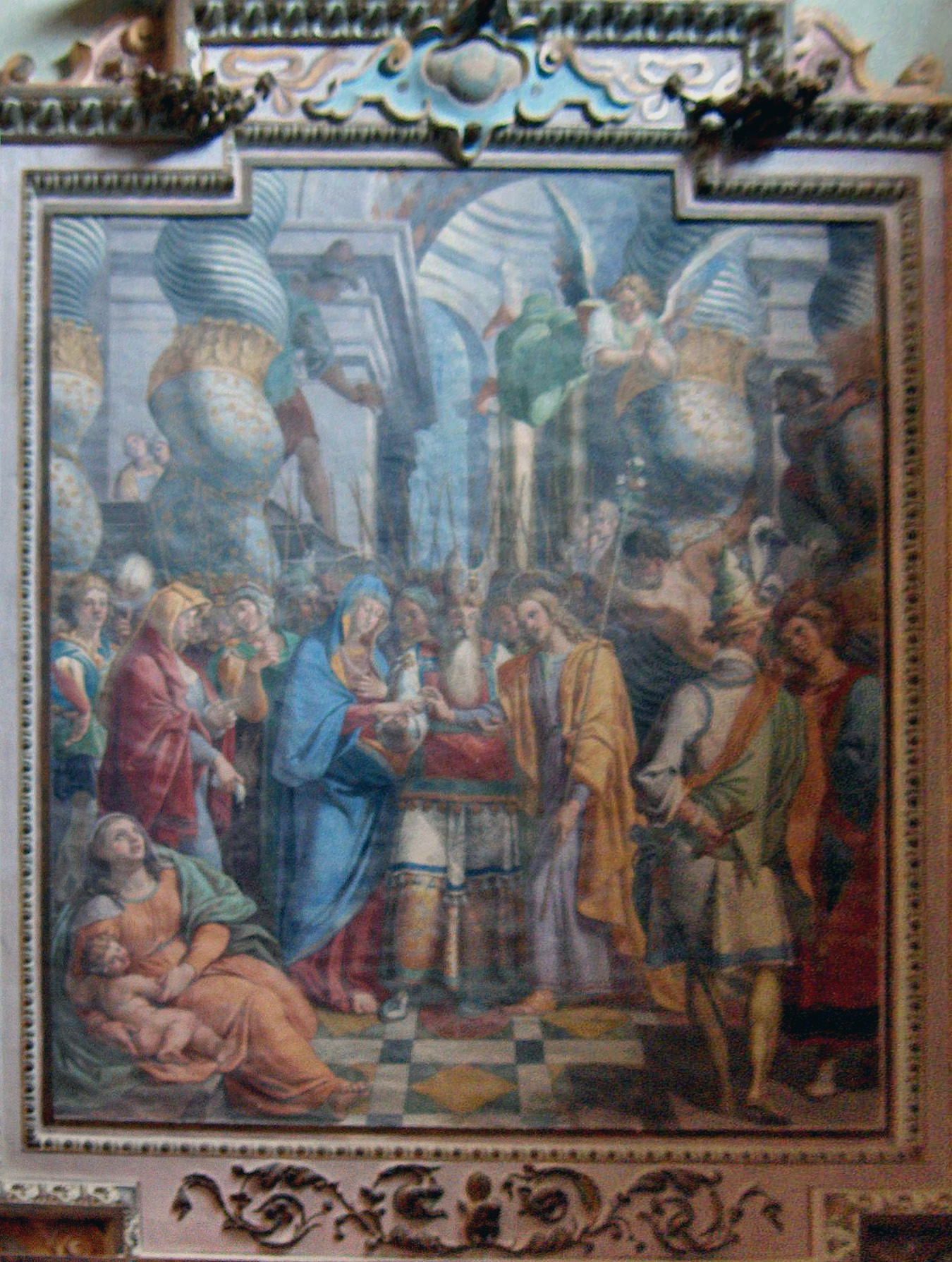 Presentation in the Temple (1602-1603) by Antonio Circignani (Pomarancio); Chapel of St. Anne; Basilica of Santa Maria degli Angeli, Assisi, Italy